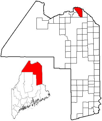 Localisation de Madawaska dans le comté d'Aroostook